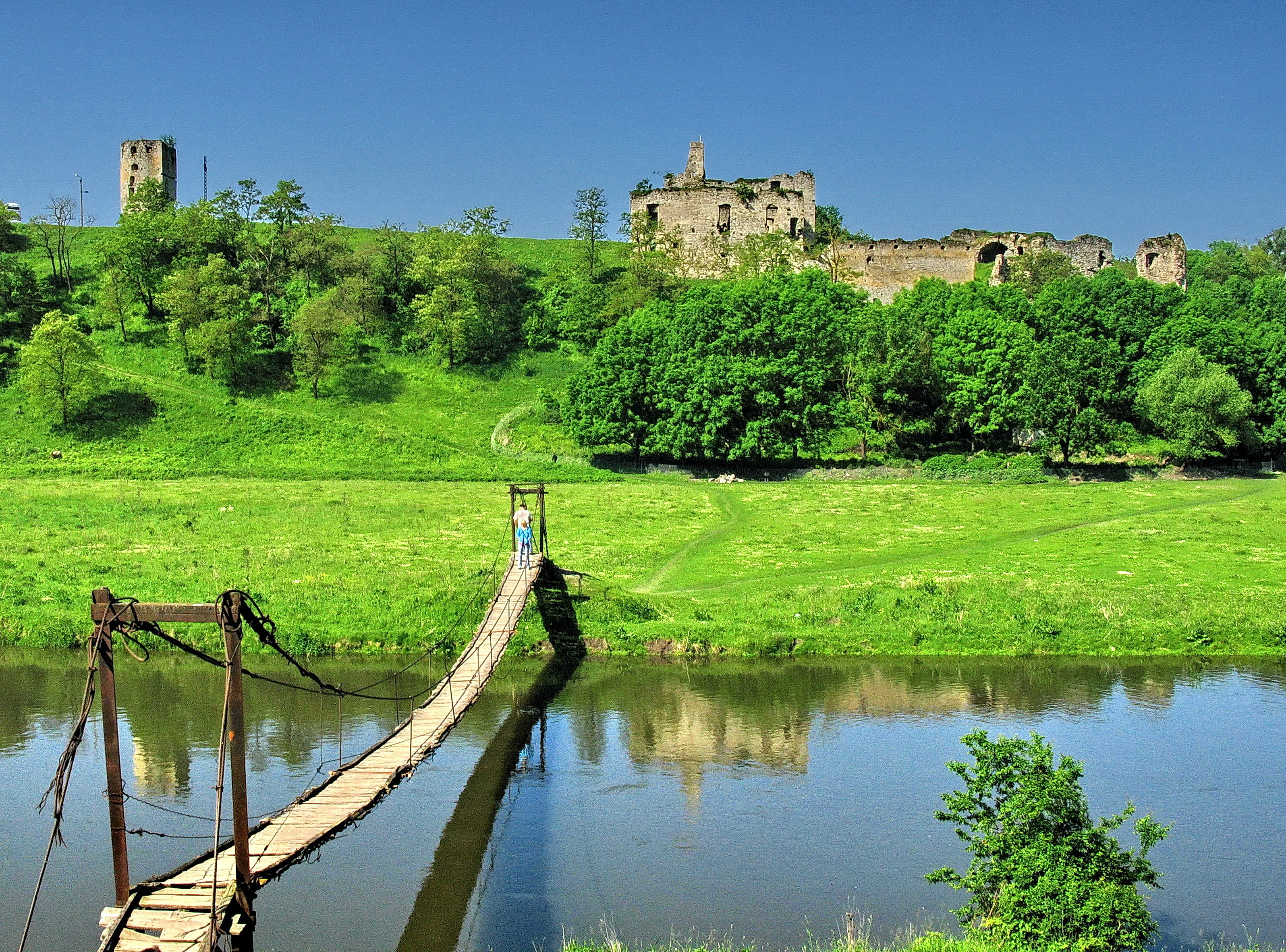 Замок (руїни), Скала-Подільська